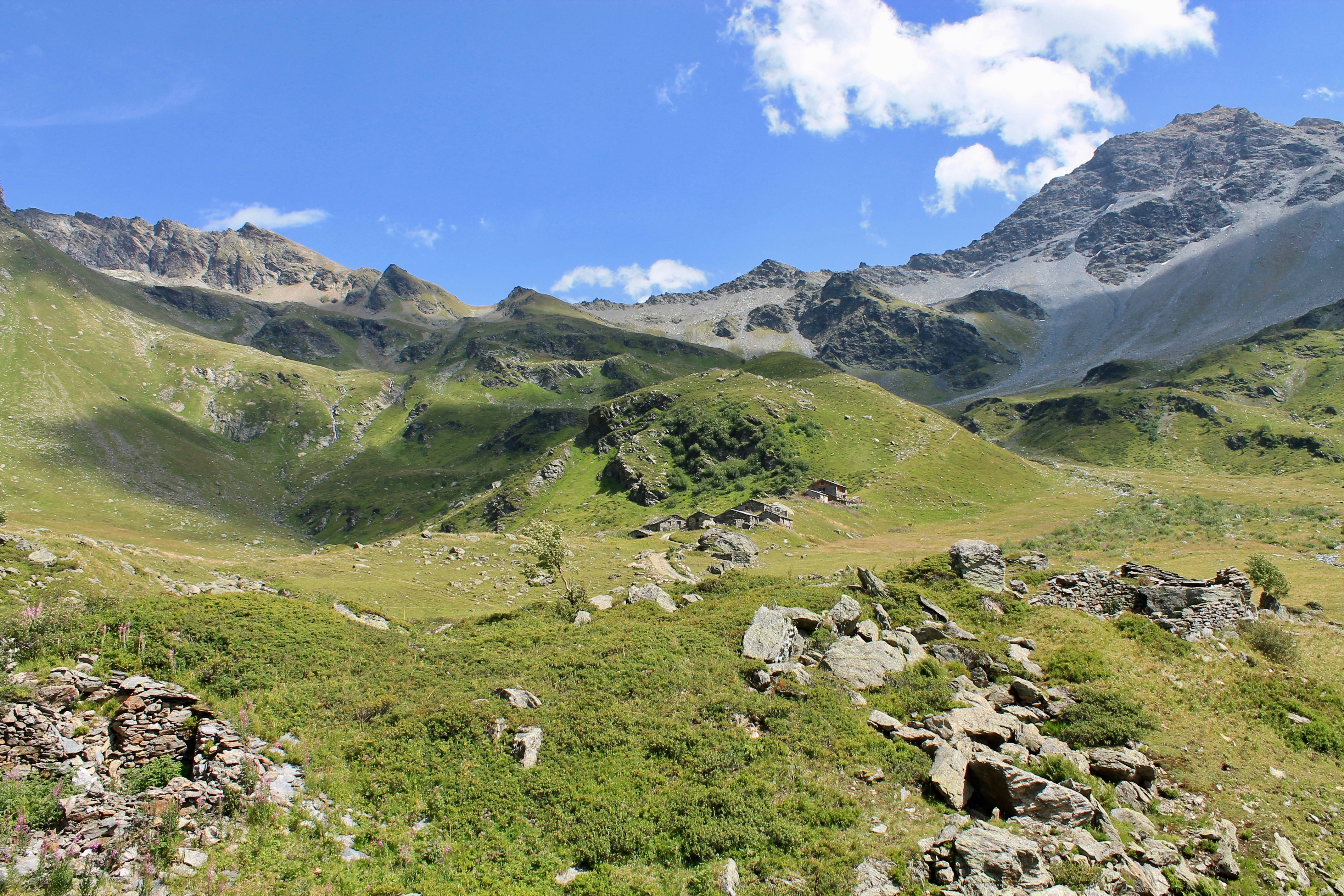 Hameau de La Motte dans le vallon de Mercuel (Sainte-Foy-Tarentaise).